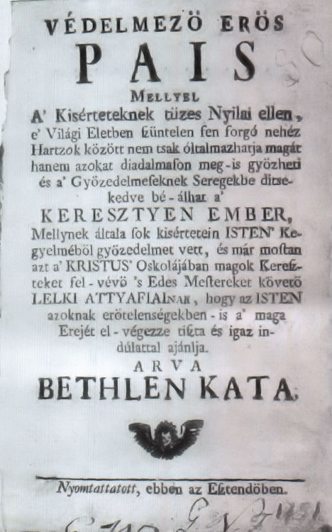 Bethlen Kata „Védelmező erős pais” című művének egy lapja.